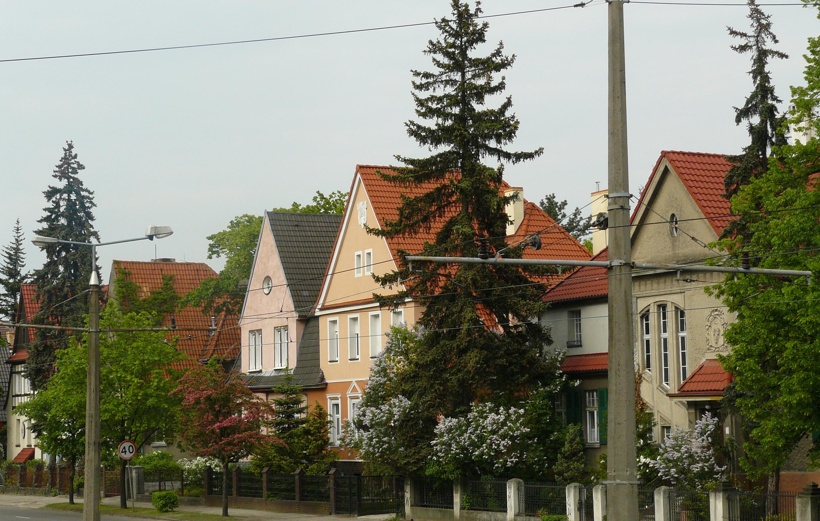 poniemieckie wille na Piaskach w Gorzowie